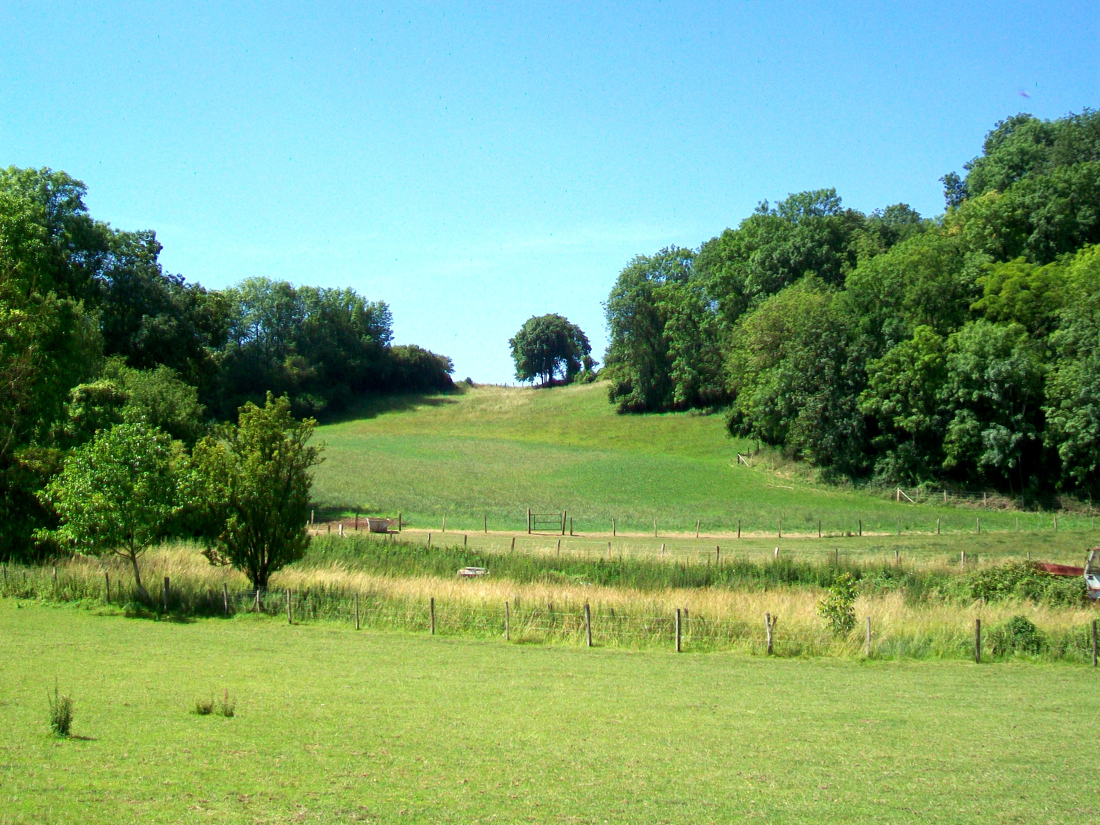 Paysage au hameau de Noël-Saint-Martin ; vue depuis la rue des Sources en direction de Roberval, de l'autre côte de la colline.